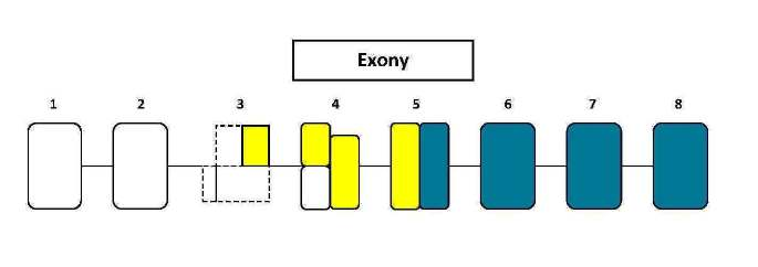 Struktura genu kódující interleukin 15